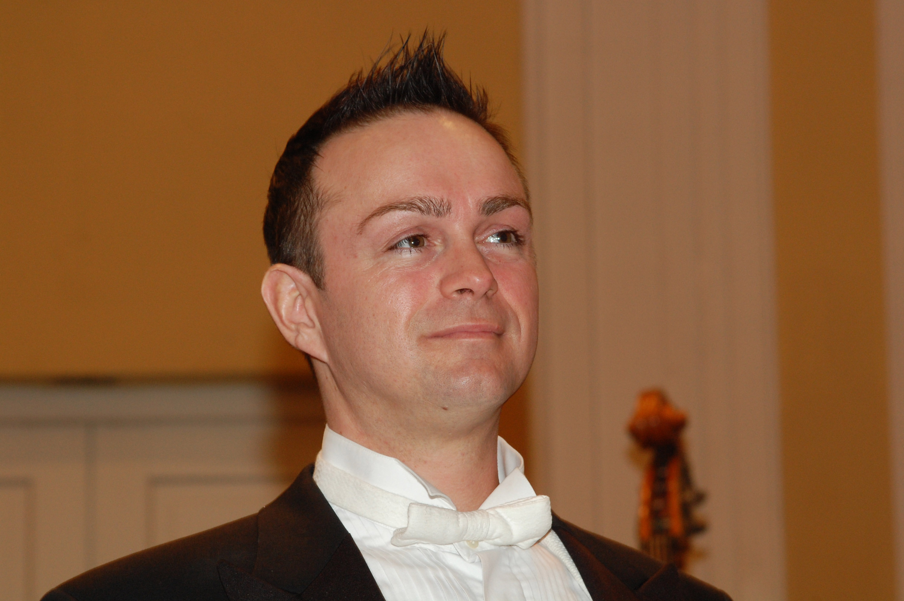 Max Prodinger bei der traditionellen Faschingsmatinee der Salzburger Kulturvereinigung im Grossen Saal Mozarteum am 22.02.09